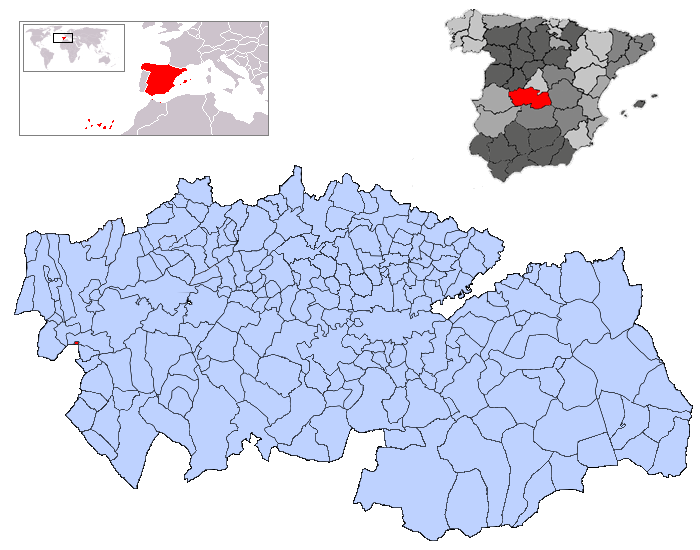 El Puente del Arzobispo en la provincia de Toledo